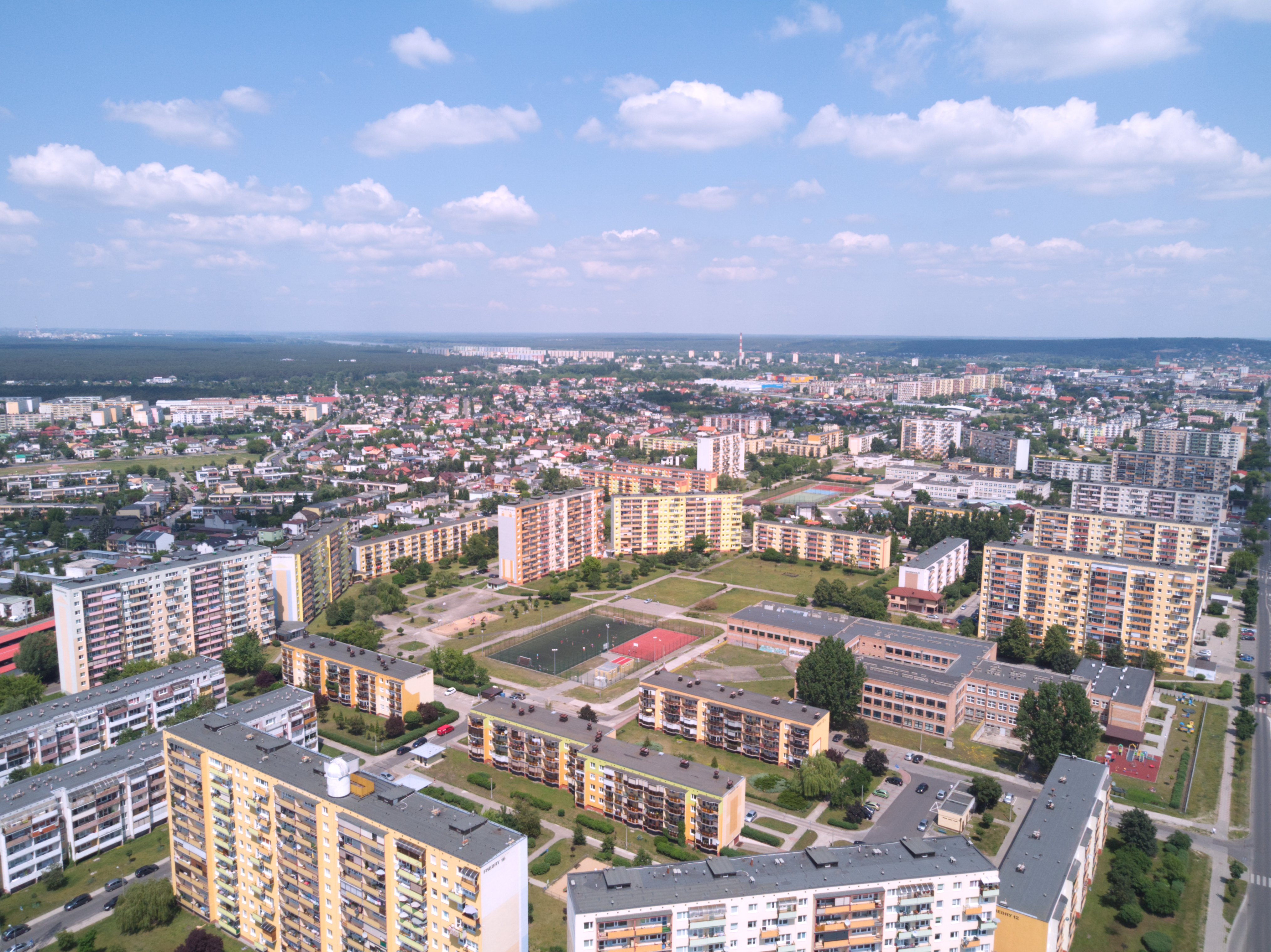 Dzielnica Południe z lotu ptaka (2020 r.)